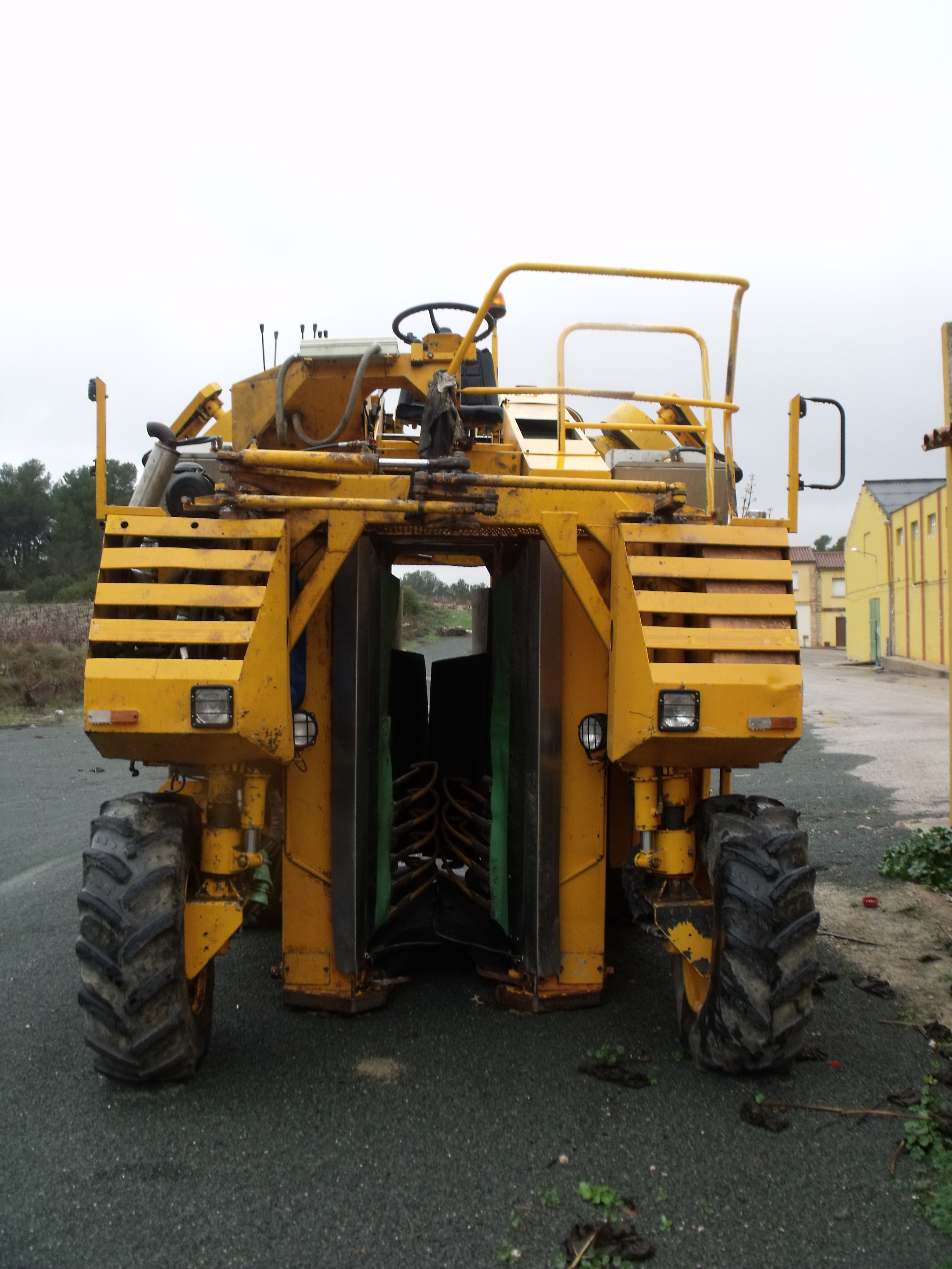 Imágenes de una cosechadora de uva